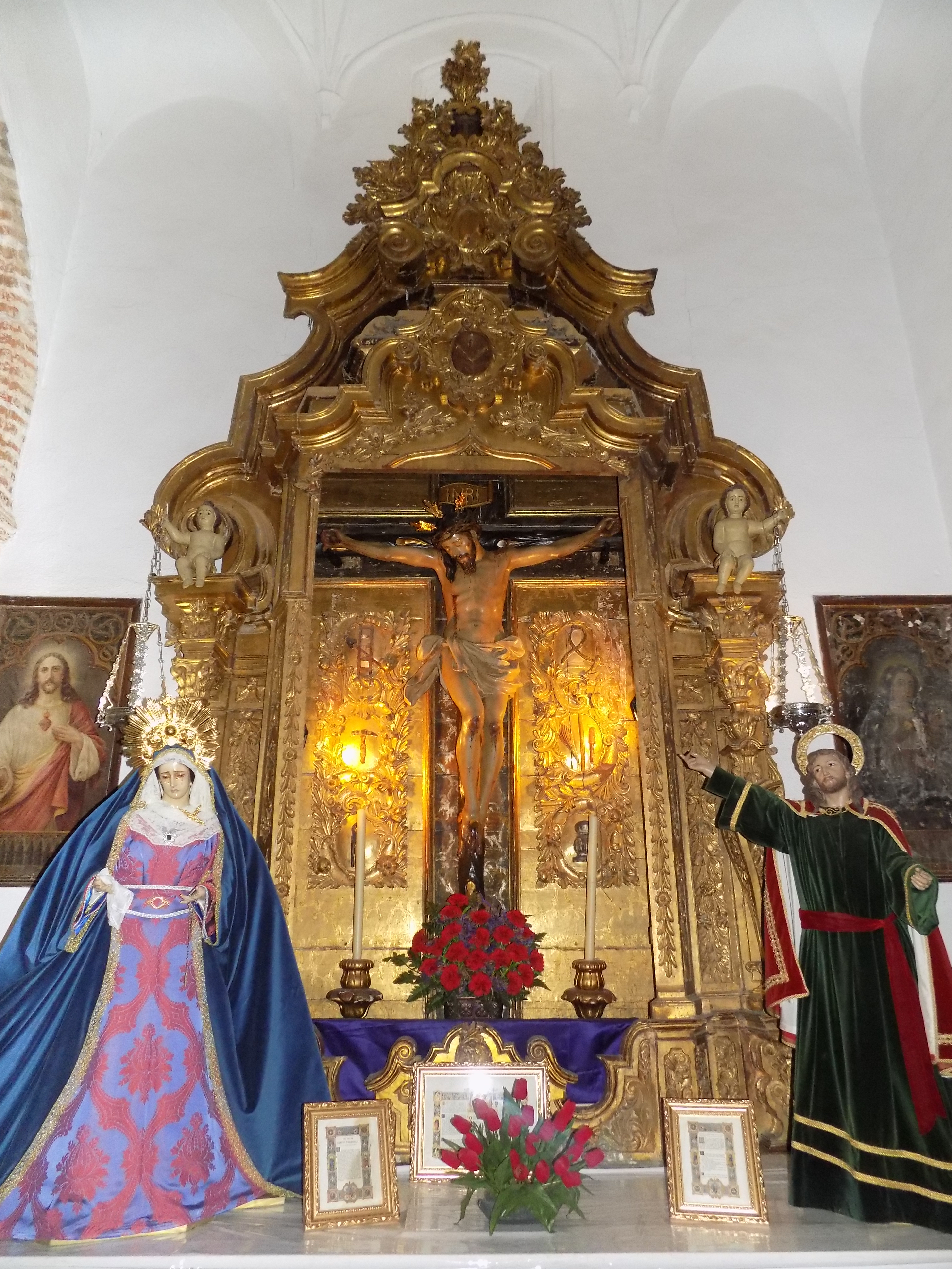 Altar mayor de la Ermita de la Caridad de Fuente Obejuna, provincia de Córdoba, (España).